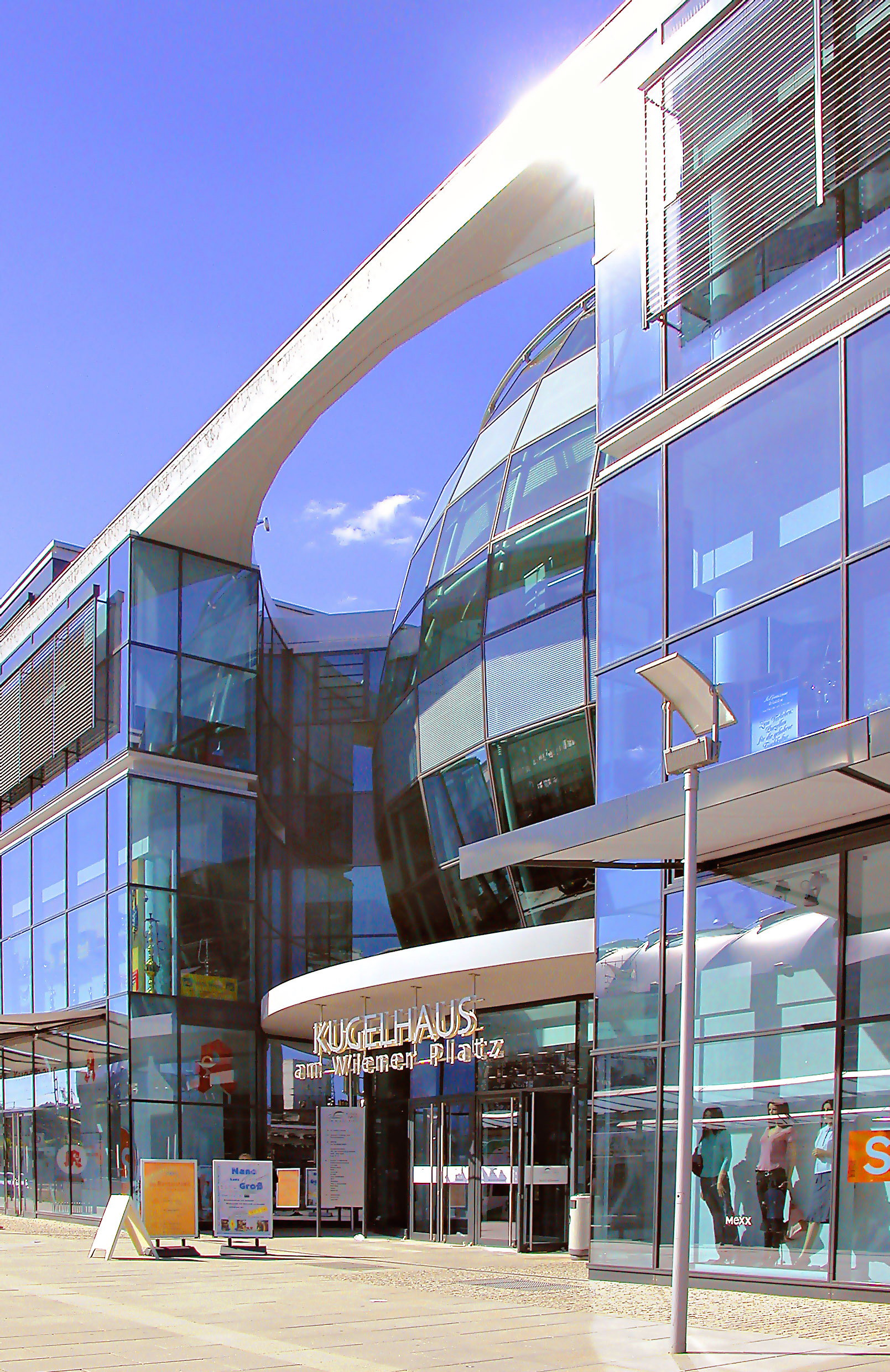 16.07.2006 01069 Dresden: Kugelhaus Wiener Platz. Erbaut 2004/05, Planung Siegbert Langner von Hatzfeld. [DSCN10737.TIF]20060716030DR.JPG(c)Blobelt